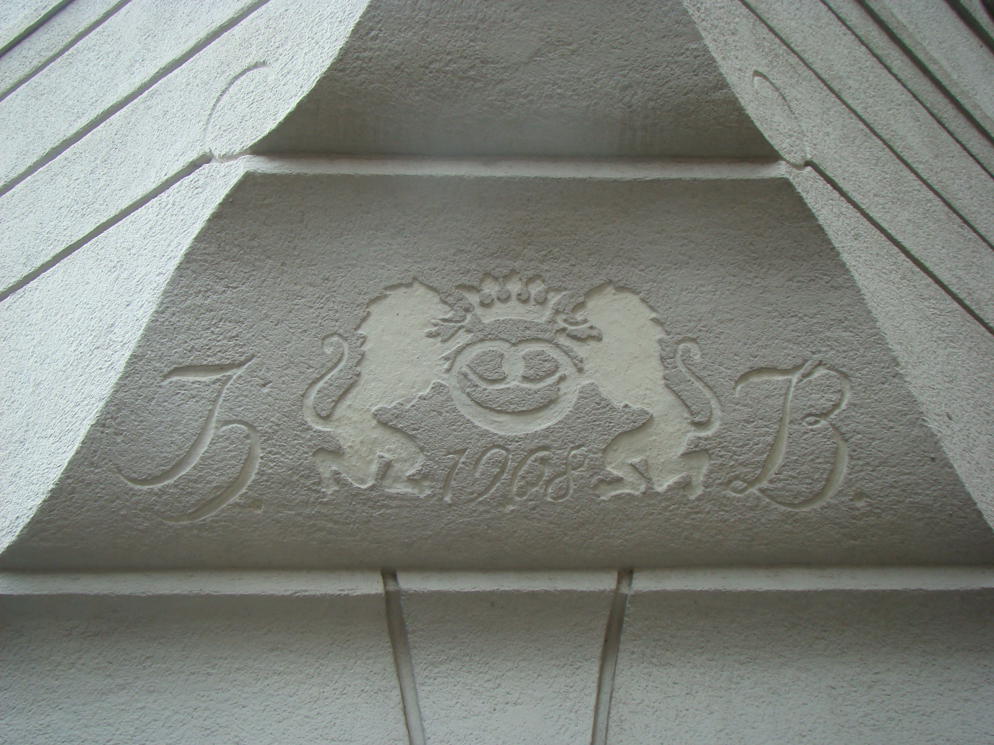 Werderstraße 157 (Heilbronn), Detail